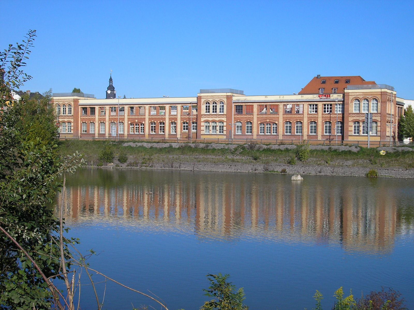 Fassade der ehemaligen Thüringischen Glasinstrumentenfabrik